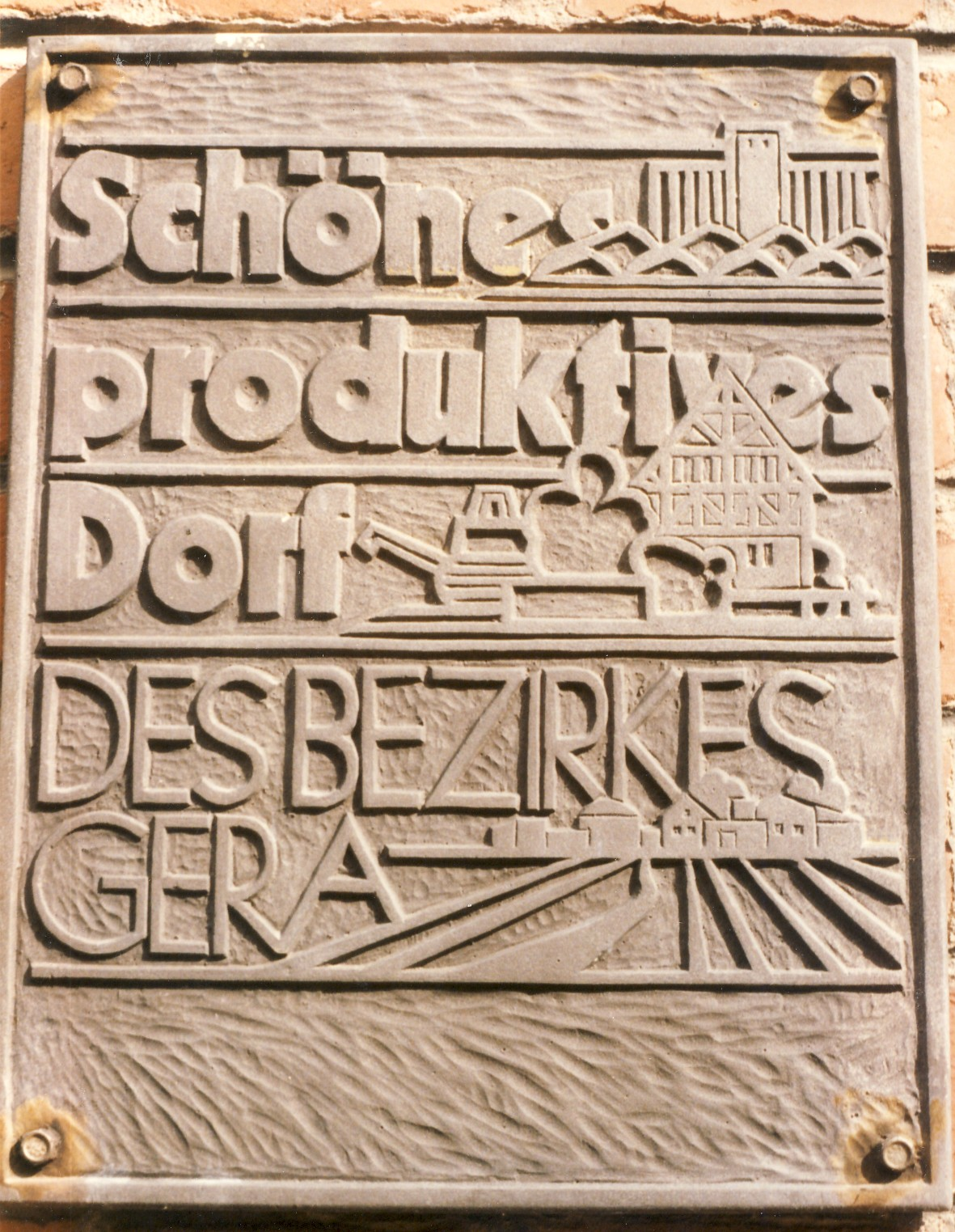 Tafel der Auszeichnung als produktives Dorf zu DDR-Zeiten